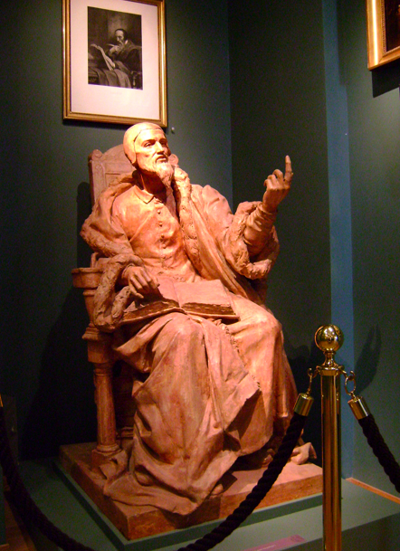 Statue de Jean Calvin par Maurice Raymond (1862-1910), musée international de la Réforme, Genève (Suisse)